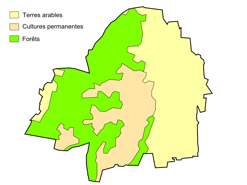 Carte d'occupation des sols de la commune de Sombrun, Hautes-Pyrénées, France